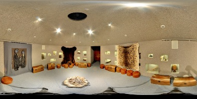 Детский раздел постоянной экспозиции ГМИР 2Начало начал""